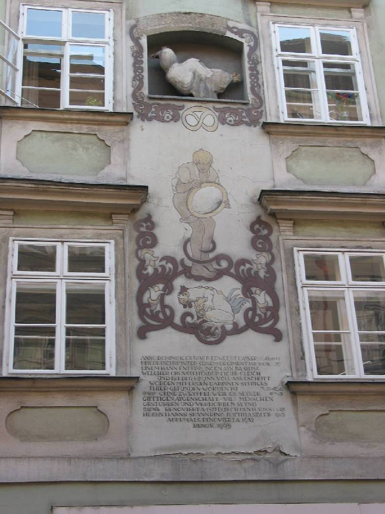 Basiliskenhaus, Schönlaterngasse 7, Wien 1., 2005-10-16 selfmade photo